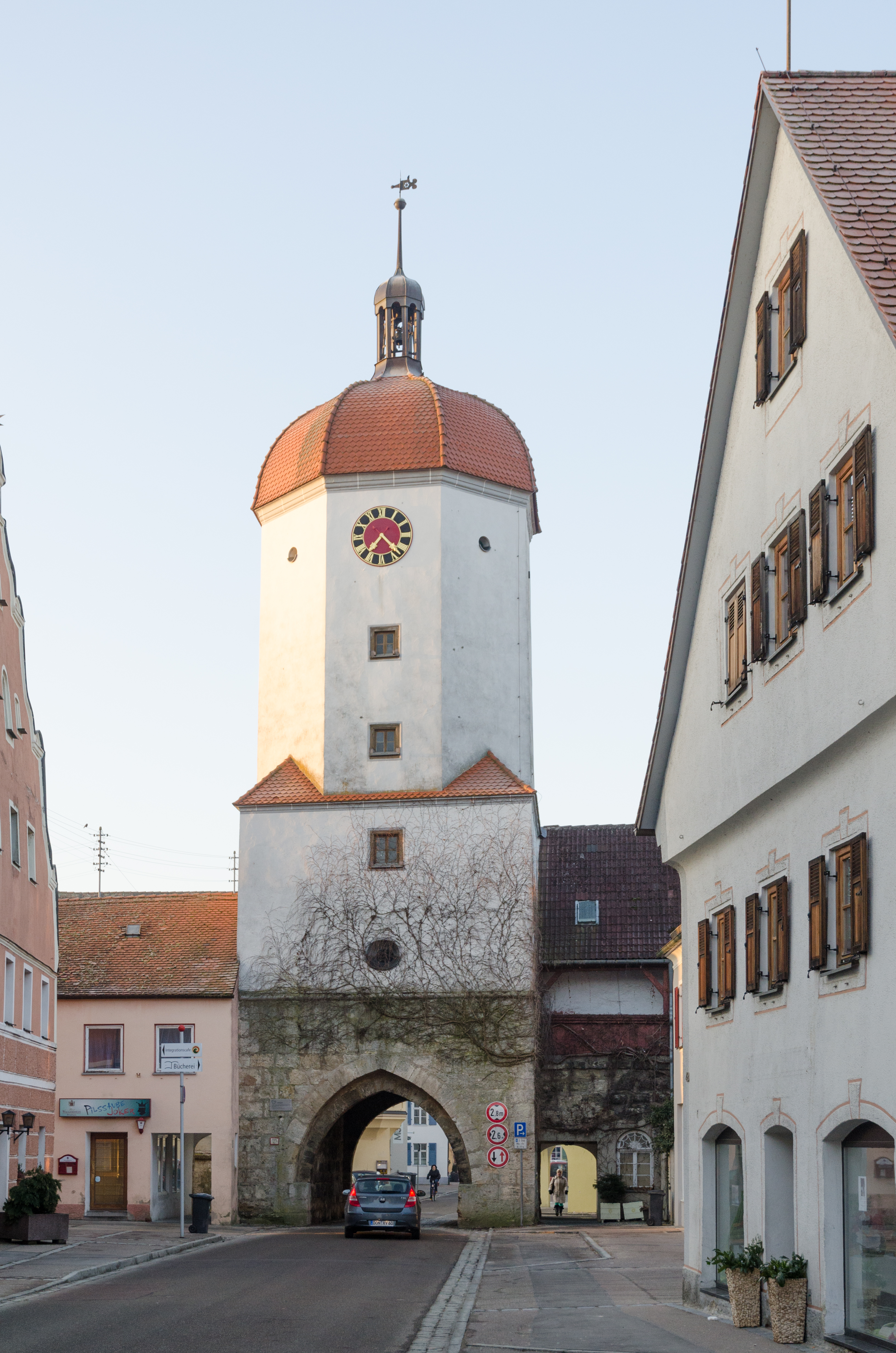 Oettingen, Königstraße 1